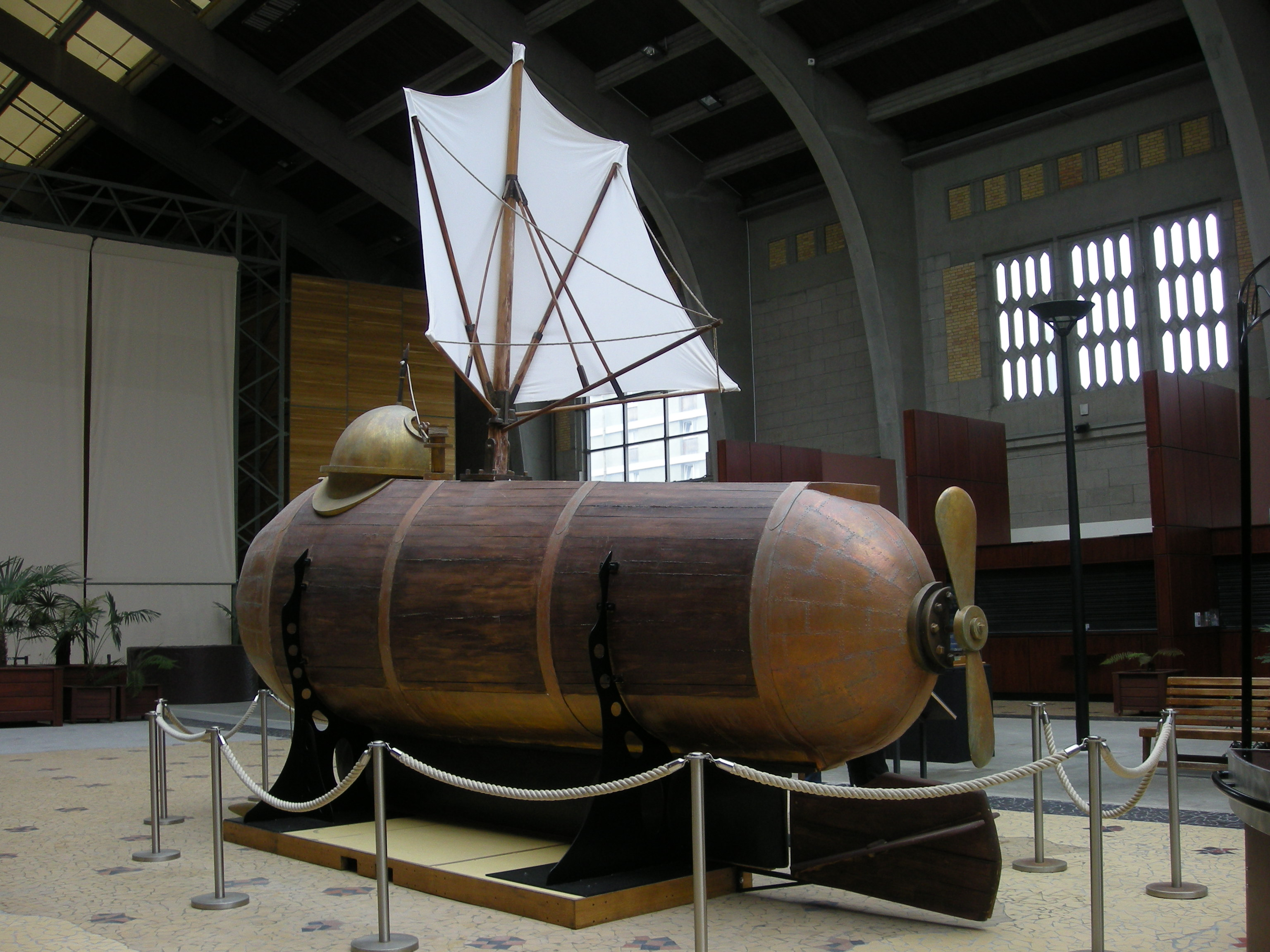 Reconstitution du Nautilus (1799) de Robert Fulton, à la Cité de la Mer (Cherbourg, Normandie)